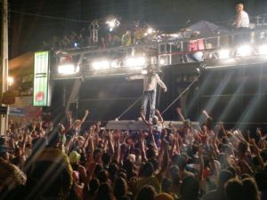 Chiclete com Banana na Garanheta